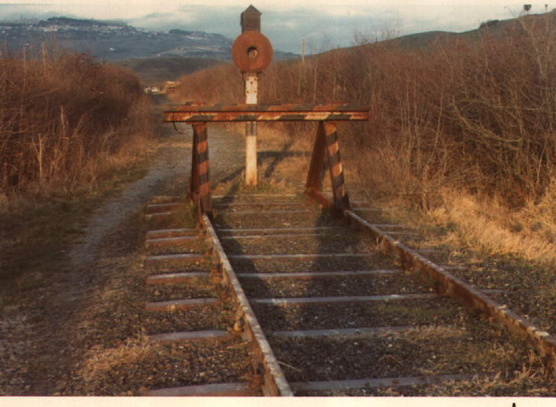 Il termine della linea Cecina-Saline, quì interrotto nel 1958 dopo lo smantellamento della tratta Saline-Volterra